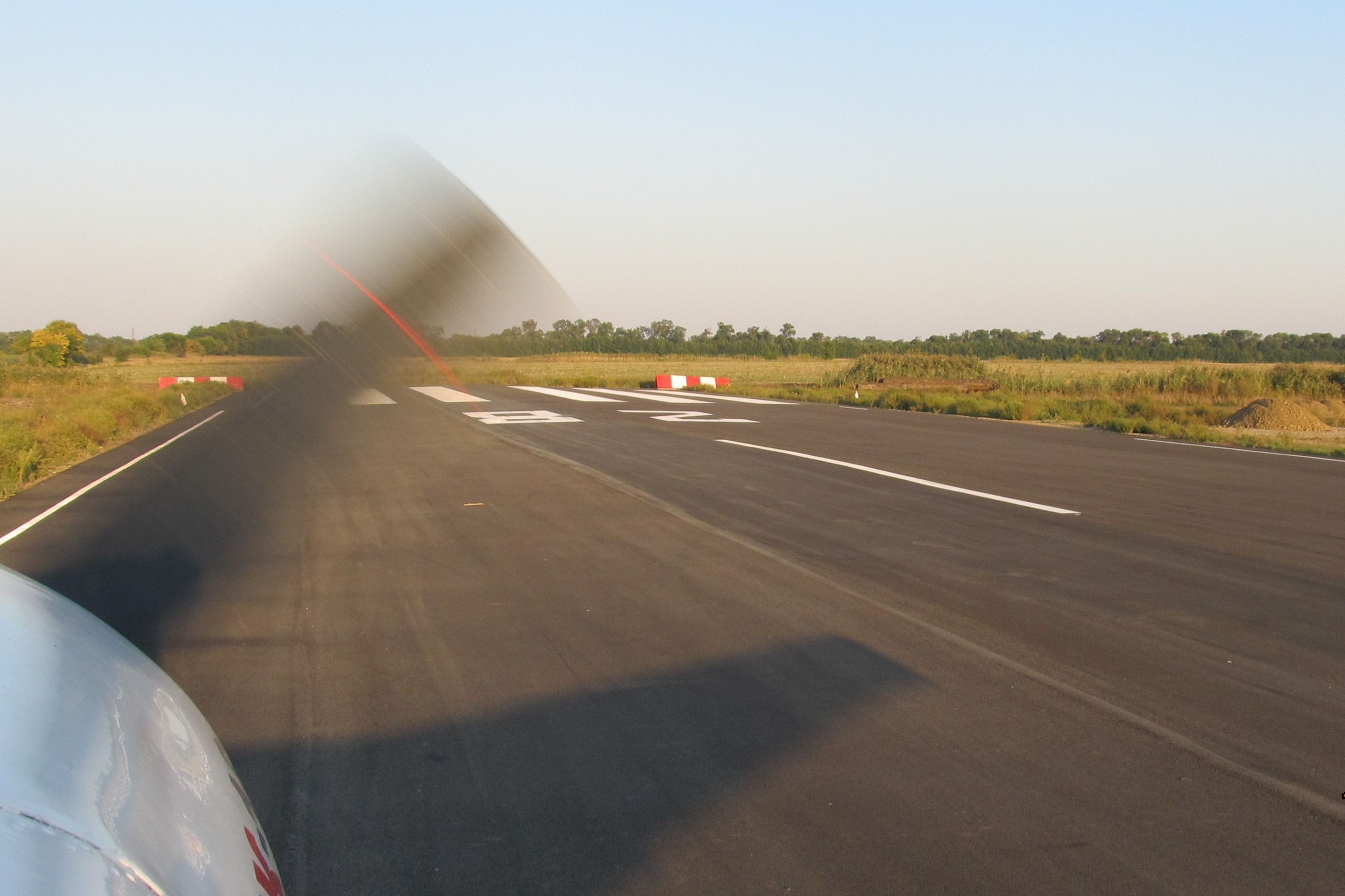 Восточный порог ВПП